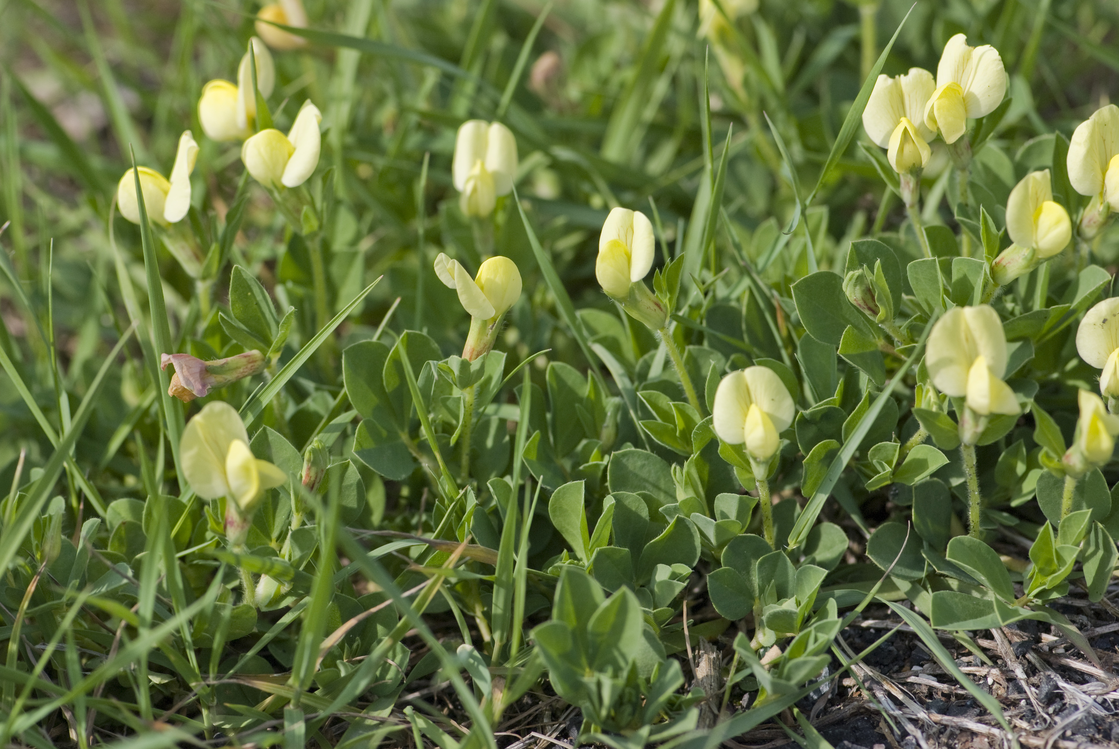 Tetragonolobus maritimus Entrée d'Autoroute à Nixeville (Meuse), France